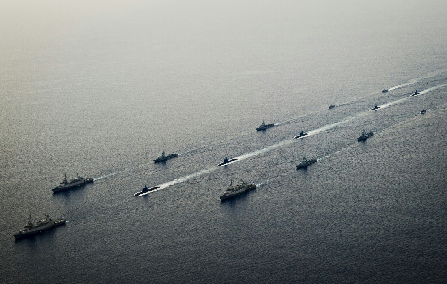 שייטת ספינות הטילים מלווה את שייטת הצוללות